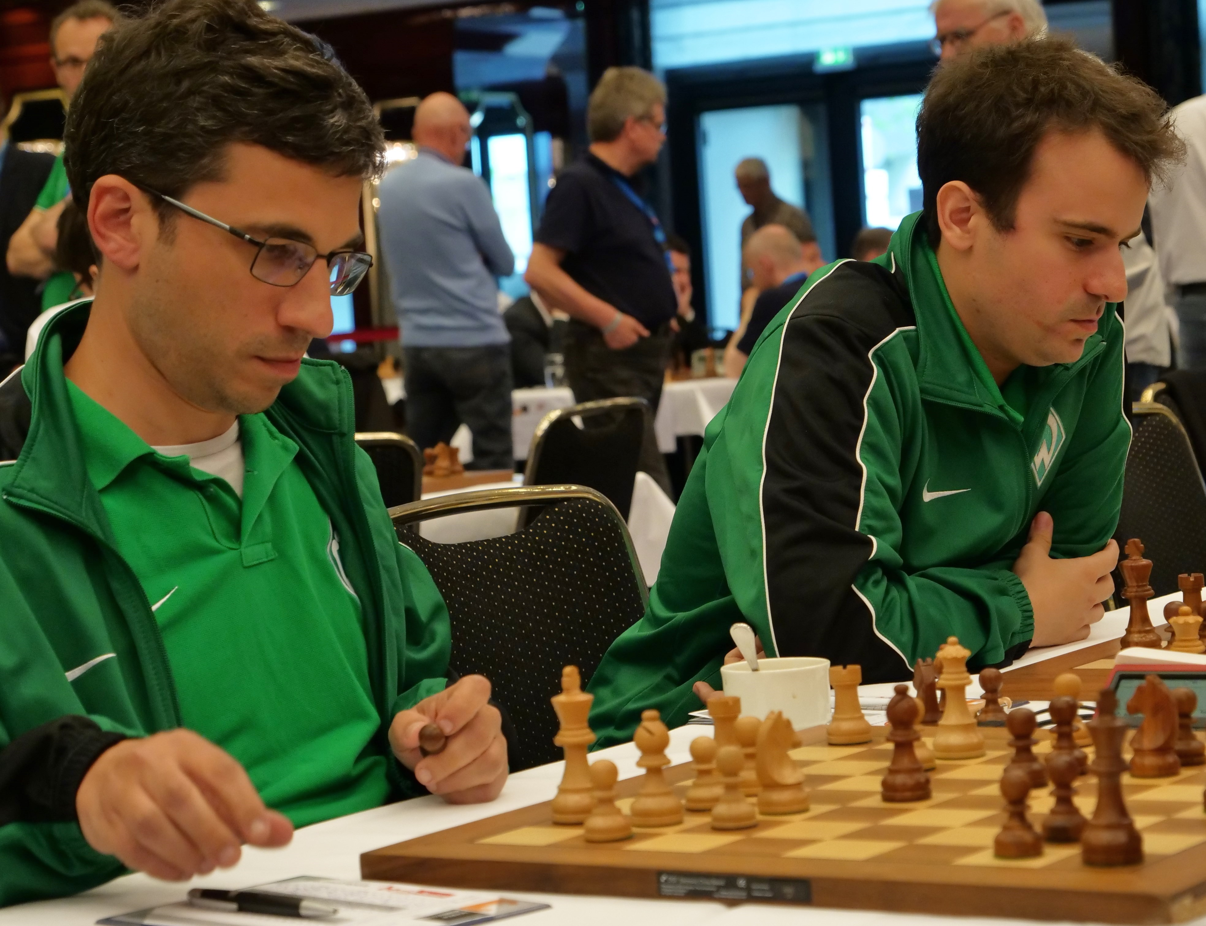 Fressinet und Edouard - Bundesliga-Endrunde 30-4-2018